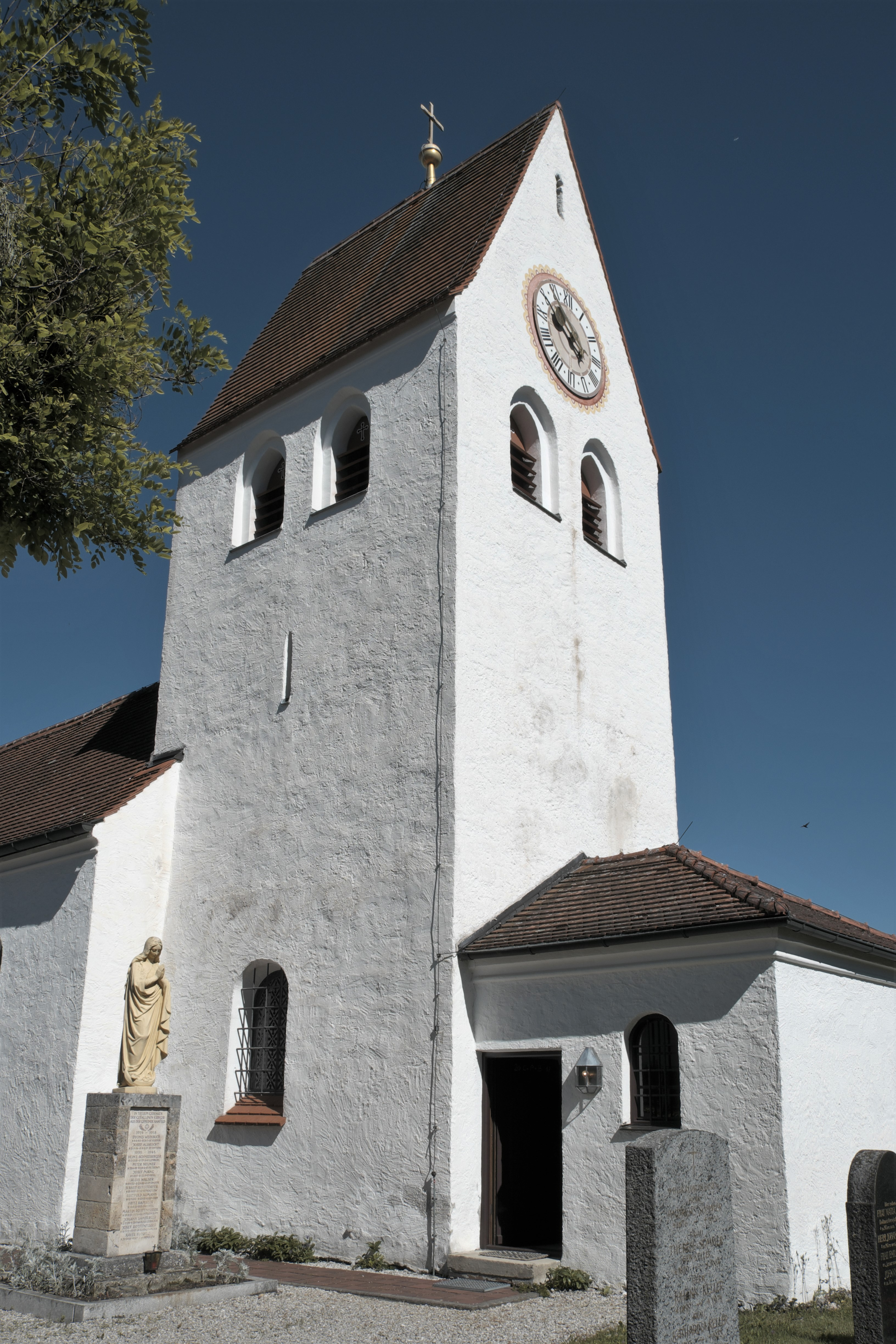 Katholische Filialkirche St. Michael in Hanfeld (Starnberg) (Bayern, Deutschland)